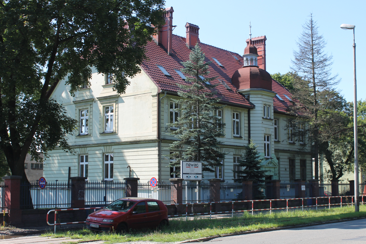 Budynek administracyjny na terenie zakładu Newag Gliwice. This photo was taken during Railway Wikiexpedition 2014 set up by Wikimedia Polska Association in cooperation with Fundacja Grupy PKP.You can see all photographs in category Wikiekspedycja kolejowa 2014.